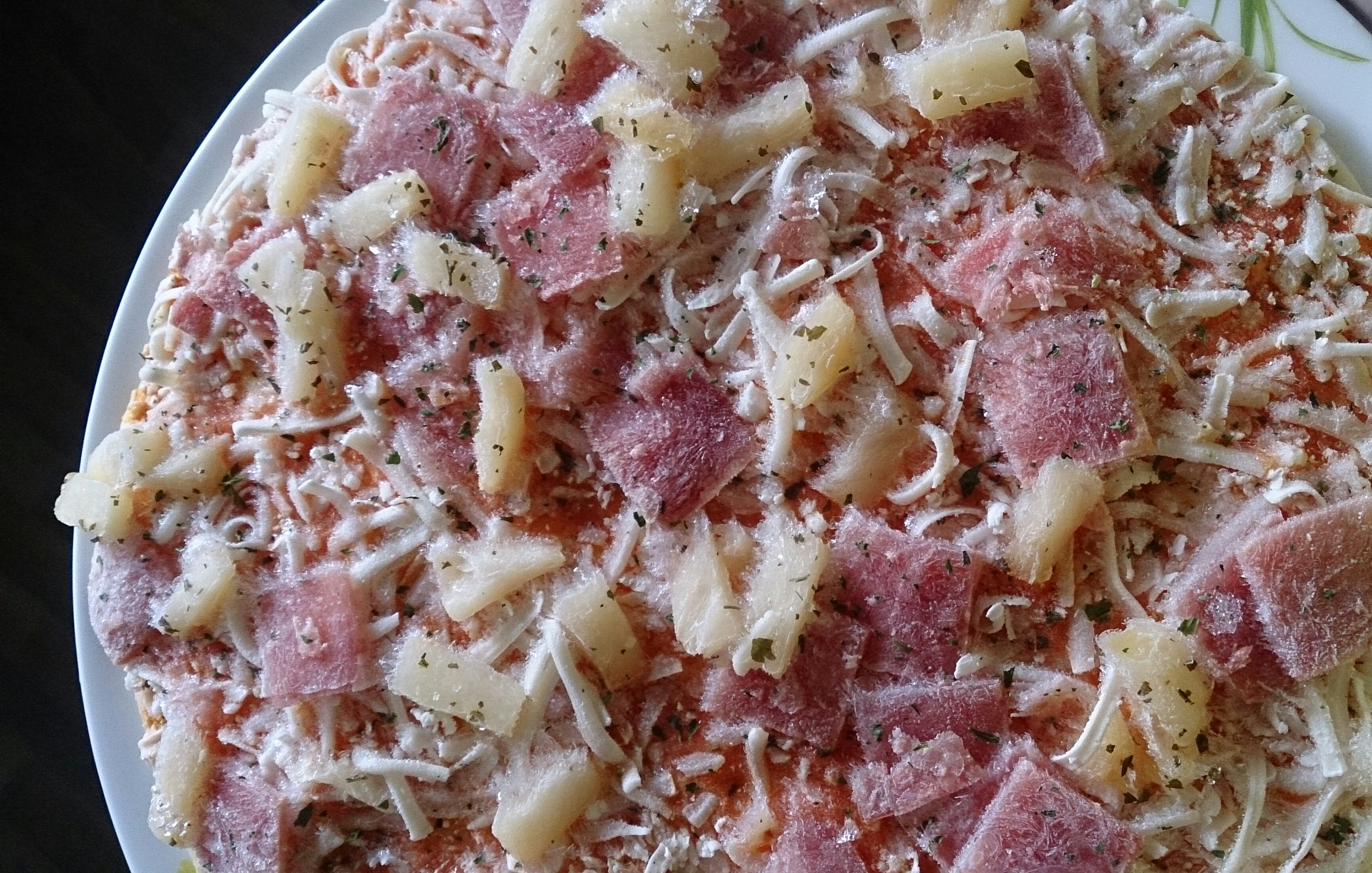 delicious after an oven treatment